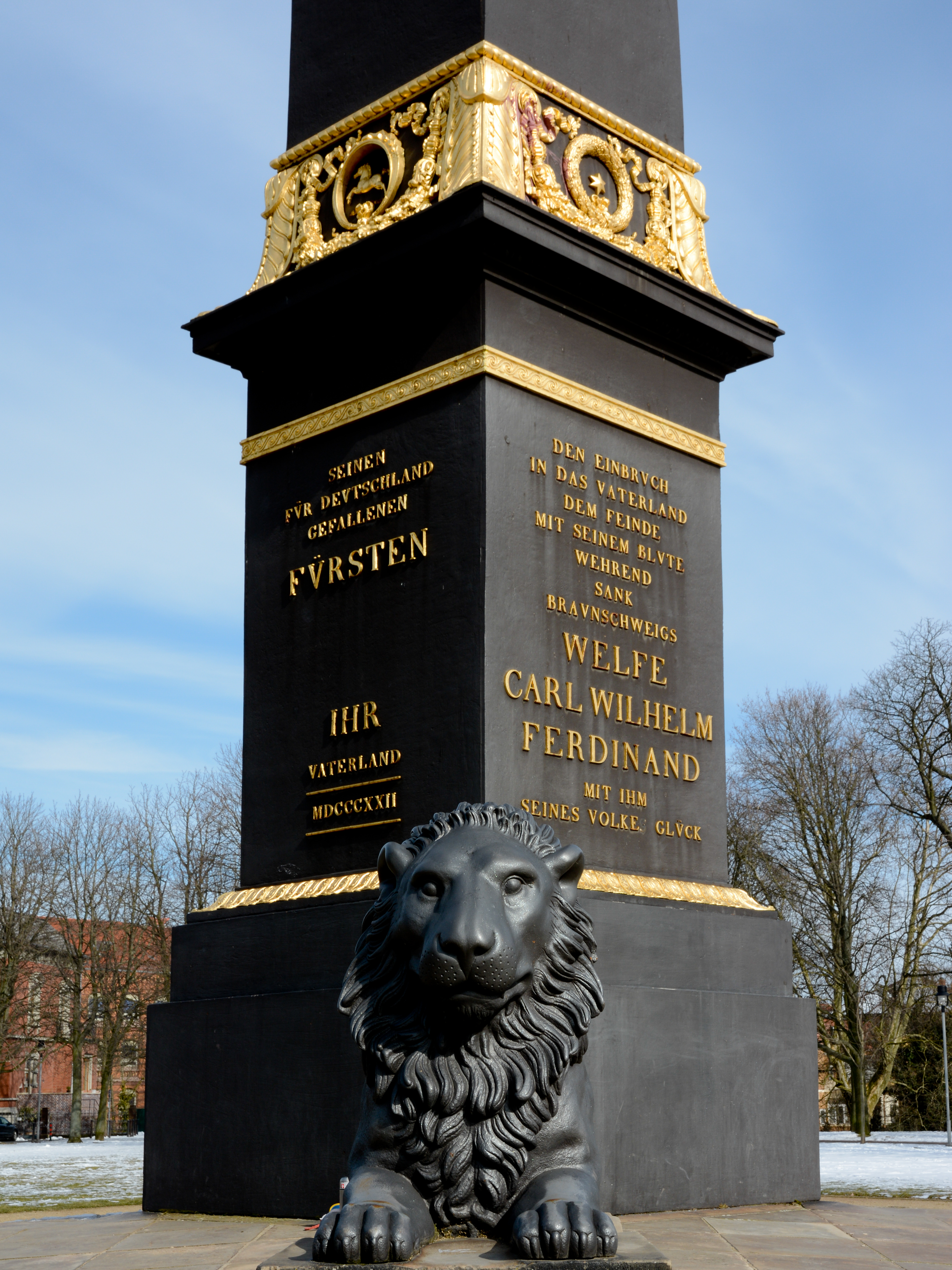 Zur Ehrung der in den Befreiungskriegen gefallenen Braunschweigischen Herzöge Karl Wilhelm Ferdinand und Friedrich Wilhelm wurde auf dem Löwenwall ein Obelisk mit Inschrifen und vier Löwenslulpturen aufgestellt.